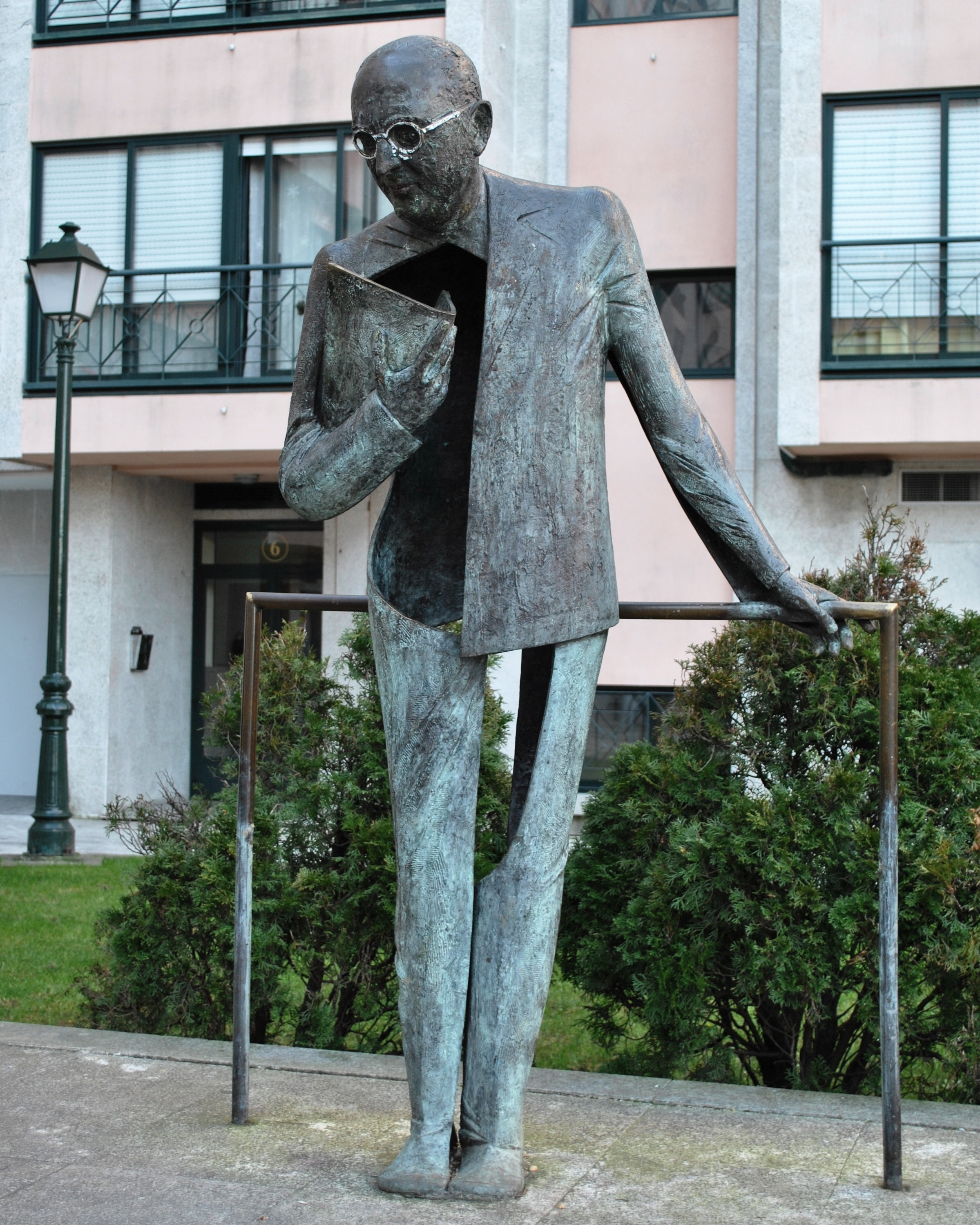 Conxunto de Buciños en Bouzas, Álvaro Cunqueiro.jpg